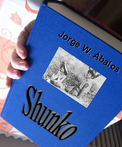 Shunko. Novela de Jorge W. Ábalos. 1947. Argentina. NOT A REAL EDITION